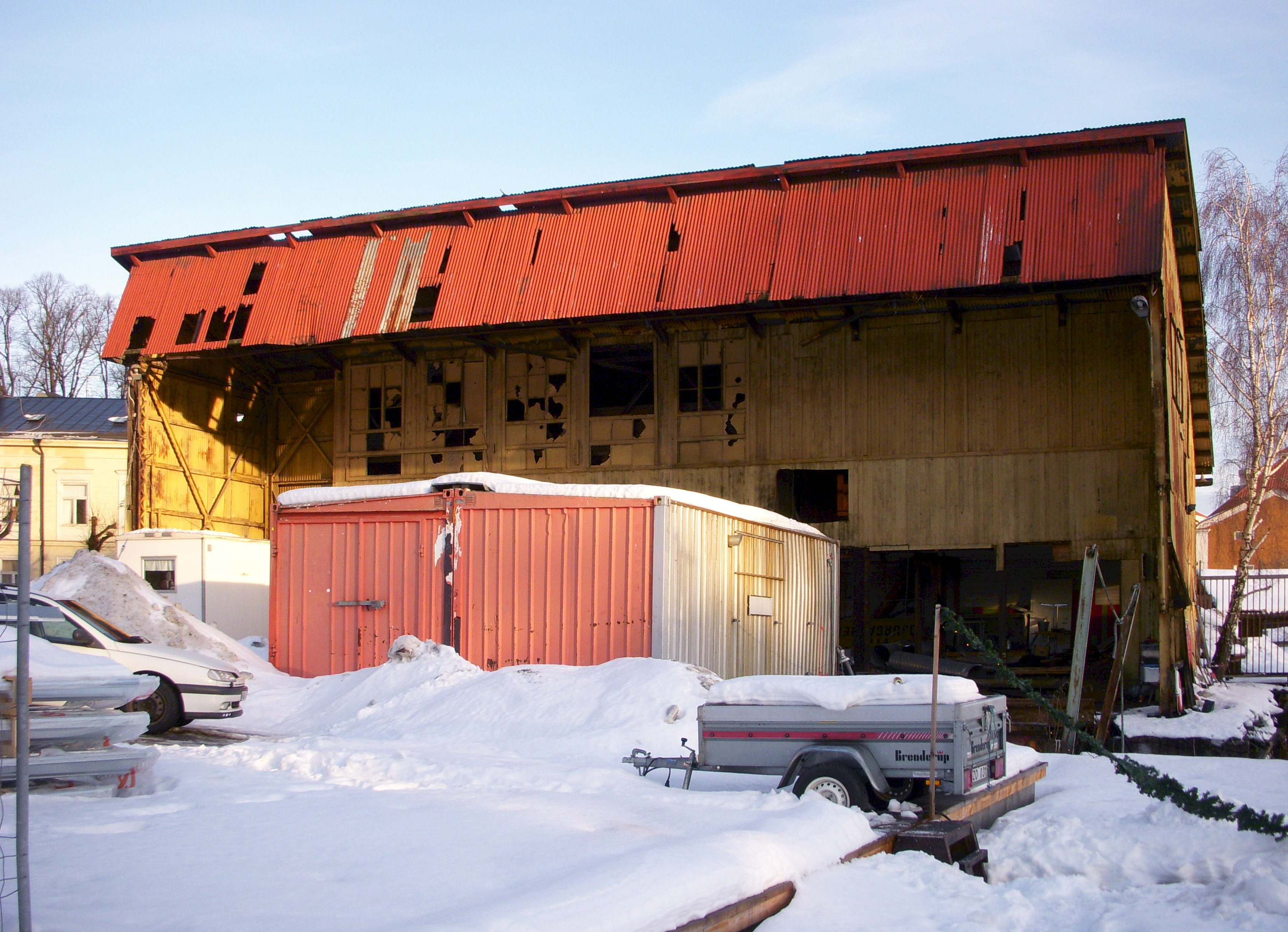 Oaxen krog och slip i gamla Djurgårdsvarvet före renoveringen